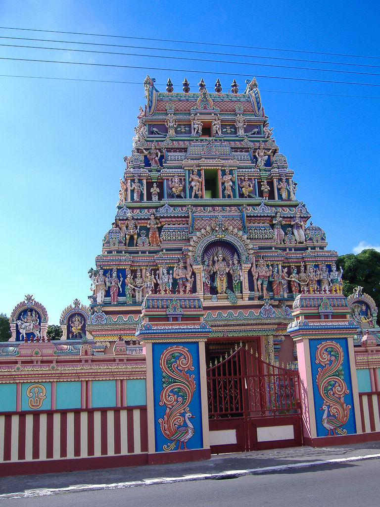 Temple tamoul à Saint-André de La Réunion.